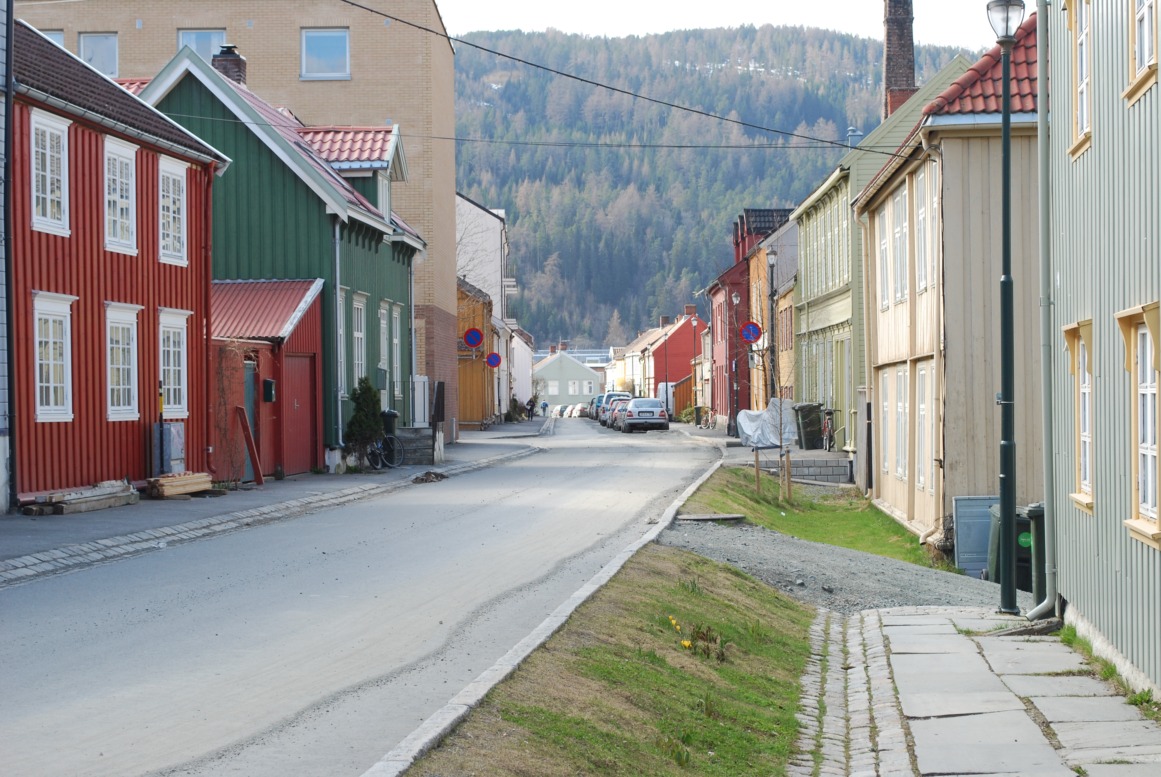 Mellomila i Ila i Trondheim, sett vestover mot Bymarka i bakgrunnen.